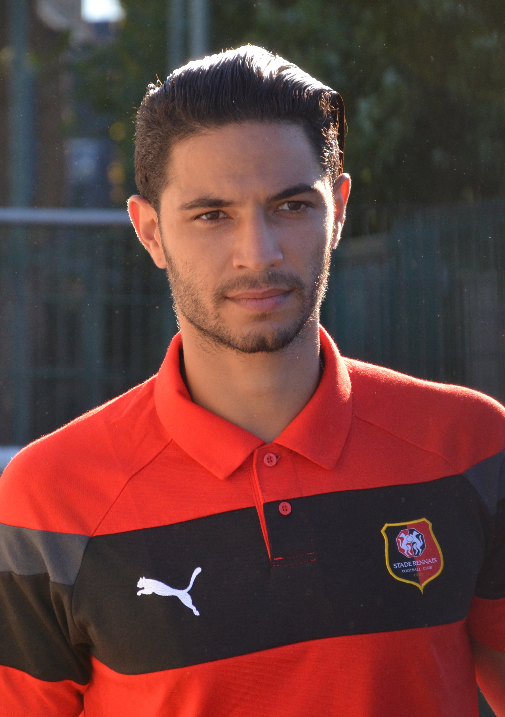 Photographie prise lors du match opposant le Stade rennais à l'USM Alger en match amical au stade Paul-Audrin de Dinard le 16 juillet 2016. Ici, Pedro Mendes.